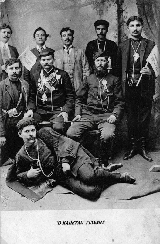 Гръцки андарти след Младотурската революция в 1908 г. Седнали Михаил Цондос и Евангелос Франгядакис. С тях е и Теохарис Кункас.